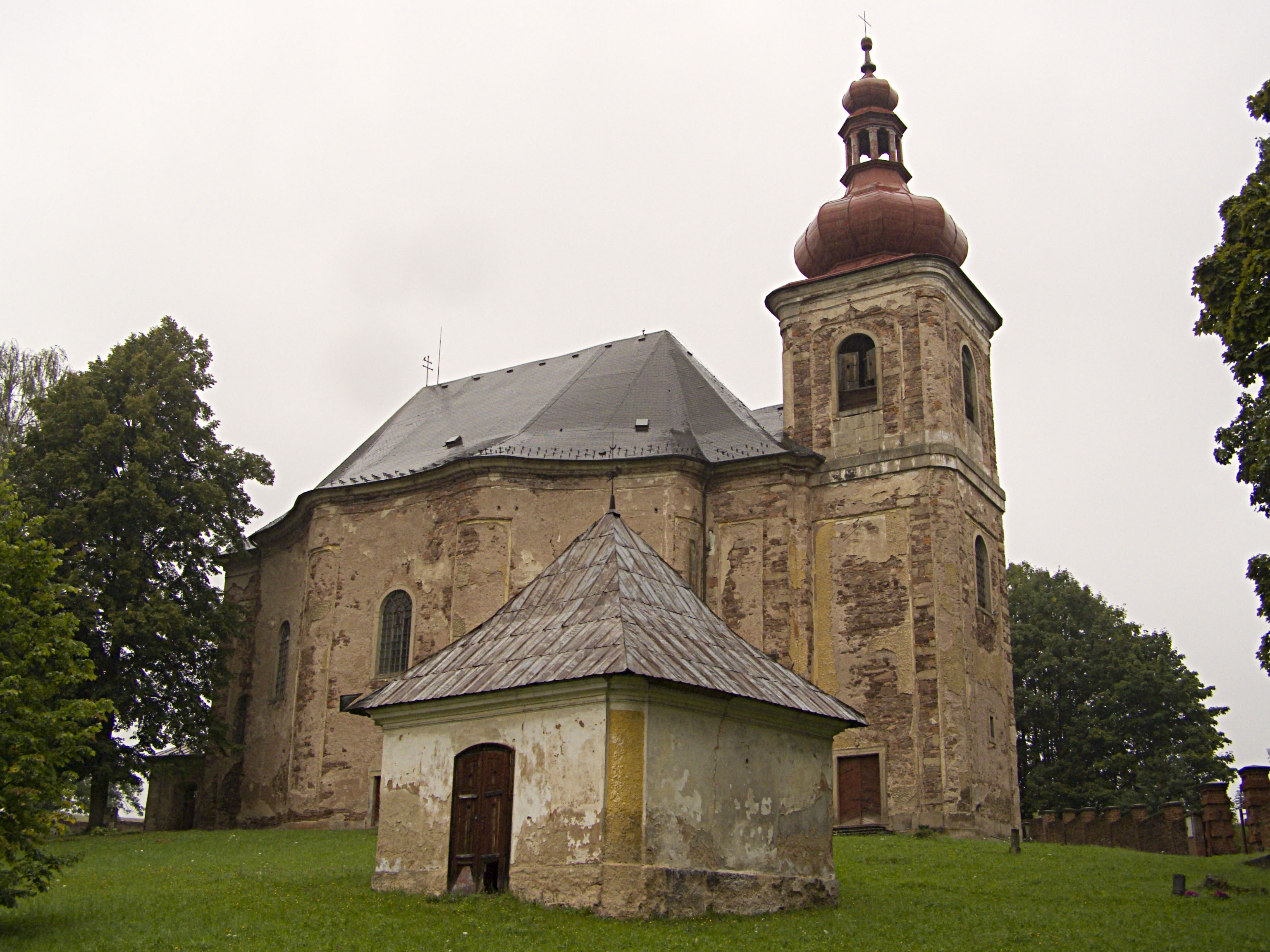 Heřmánkovice, Kostel Všech svatých